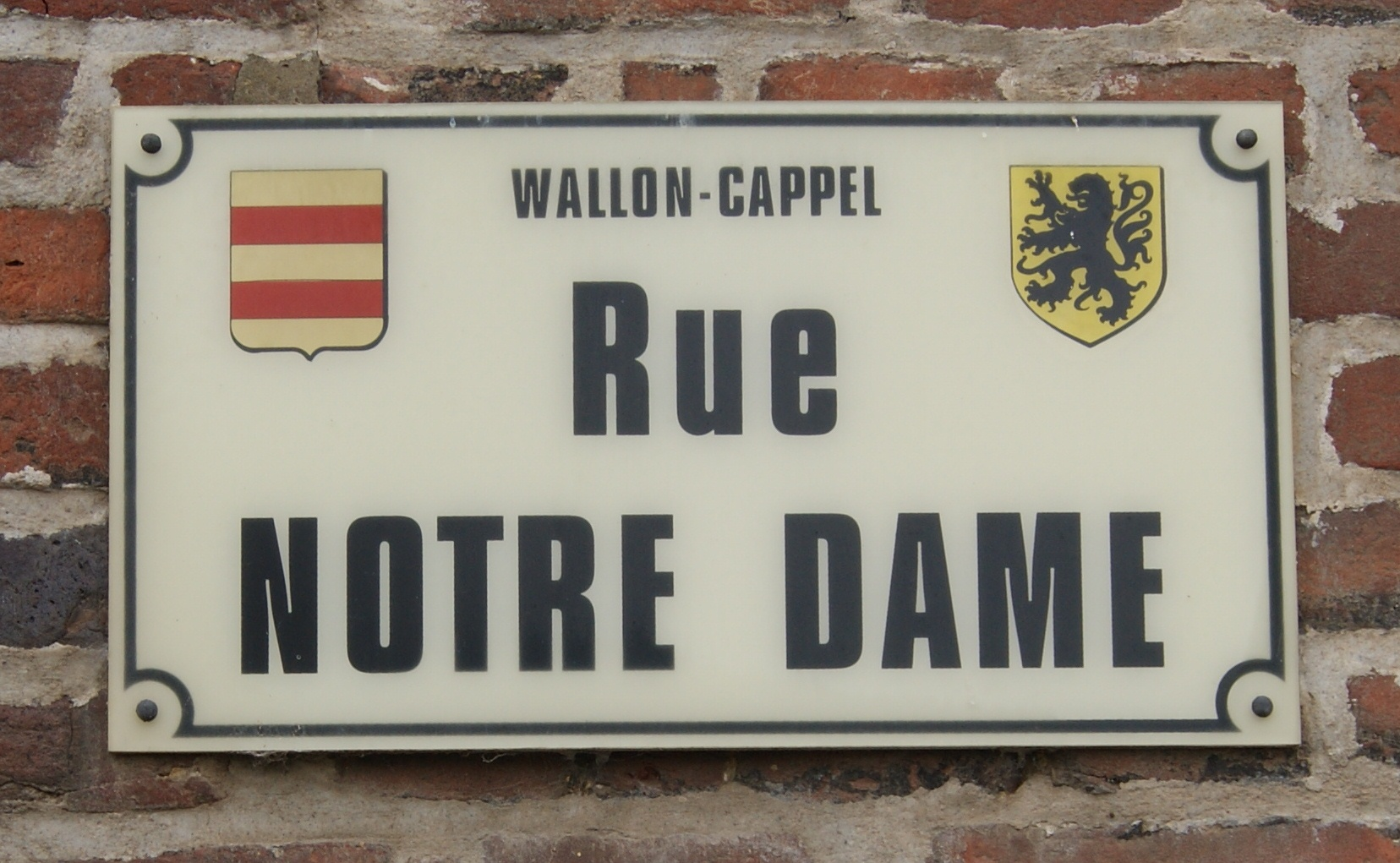 Rue Notre Dame, à Wallon-Cappel